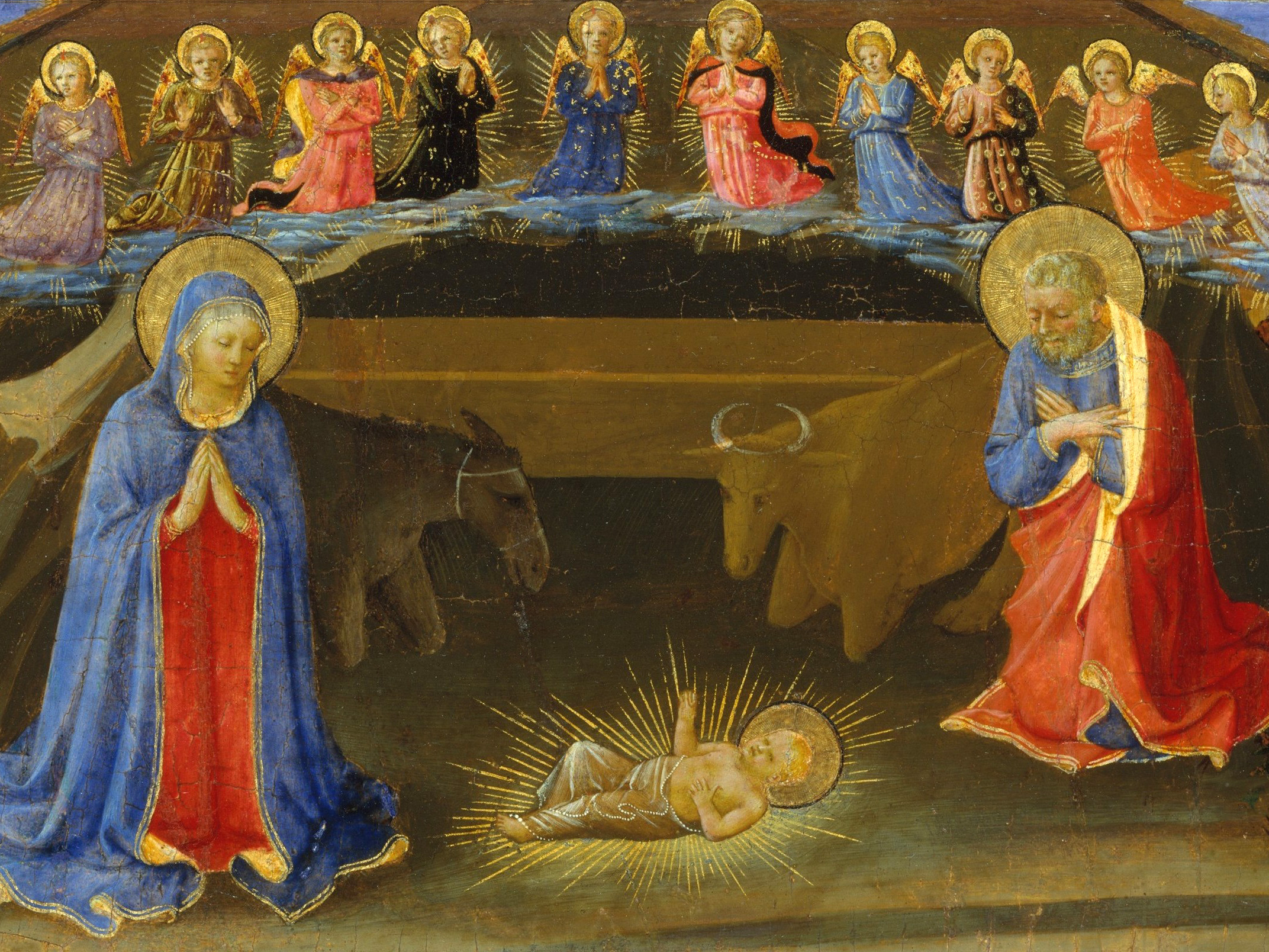 Painting; Paintings